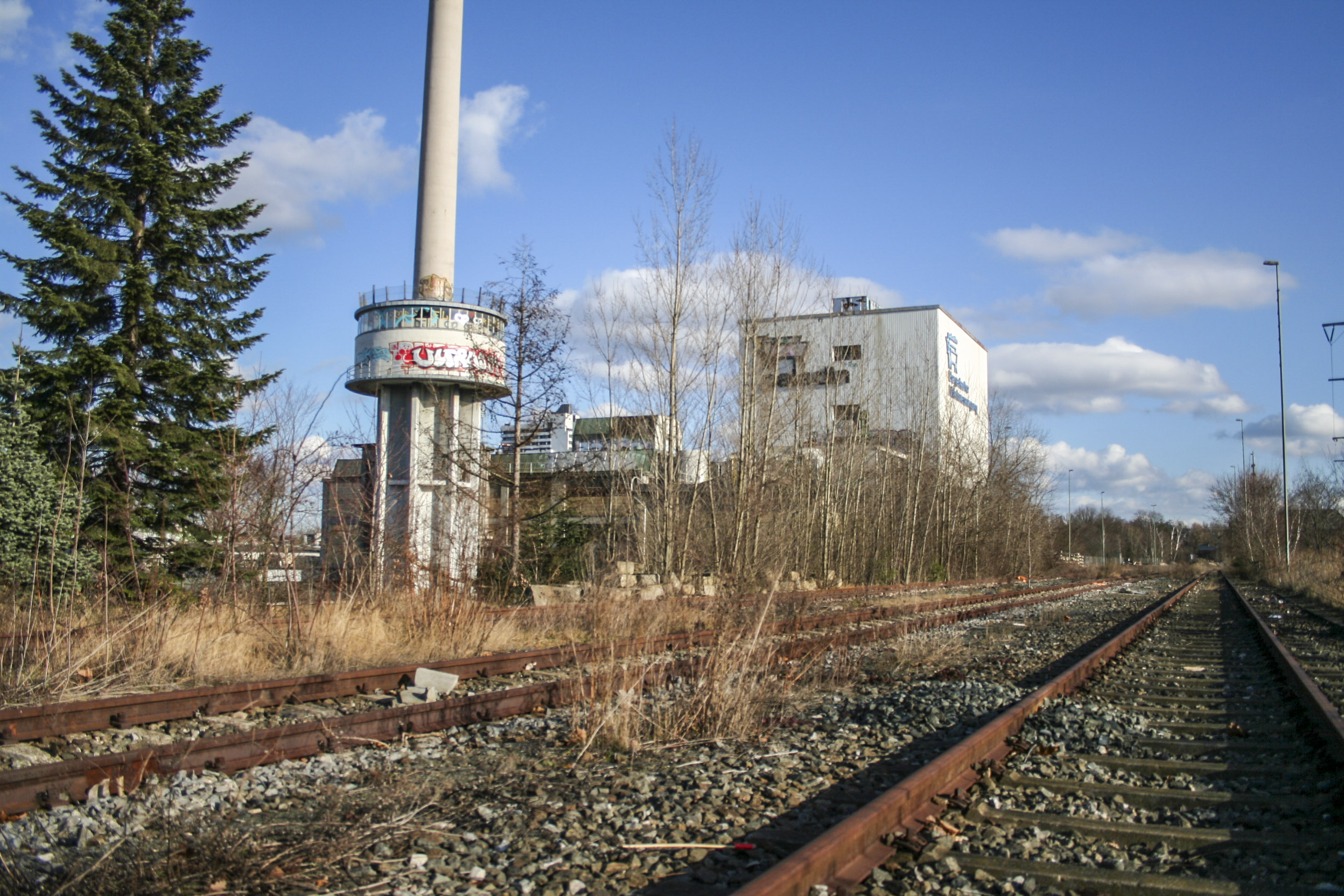 Milchhof Nürnberg, 2007, Ansicht von Südwesten